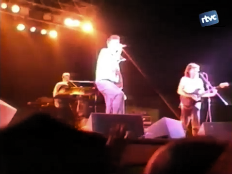 Reportatge de RTVCardedeu sobre el concert que Sau va realitzar a la localitat en 1991.